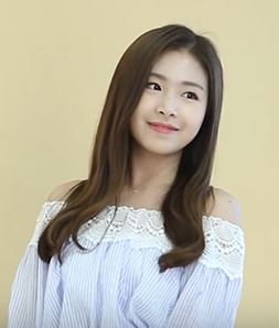 [TV텐] 에이프릴(April) 인터뷰 메이킹 영상